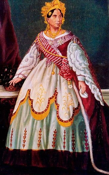 Queen Rasoherina